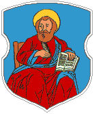 Herb wsi Jałówka